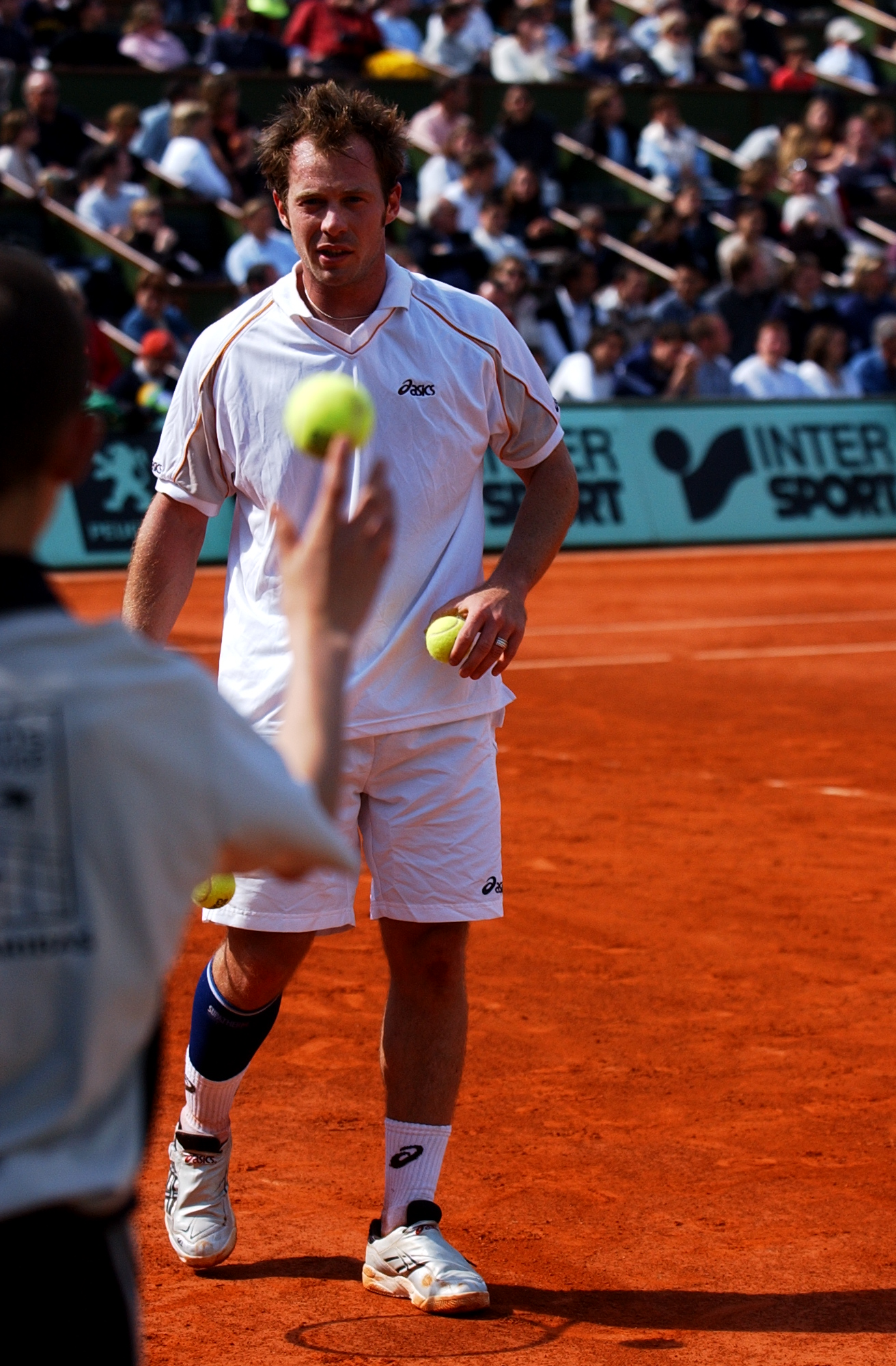 Julien Varlet en plein match à Roland Garros